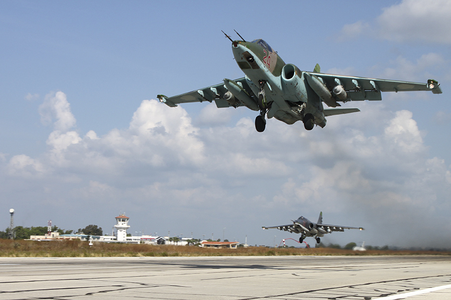 Полеты российской авиации с аэродрома Хмеймим (Сирийская Республика)